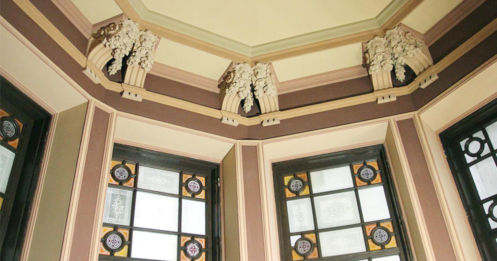 Элемент отделки интерьера особняка фон Рекк после реставрации)